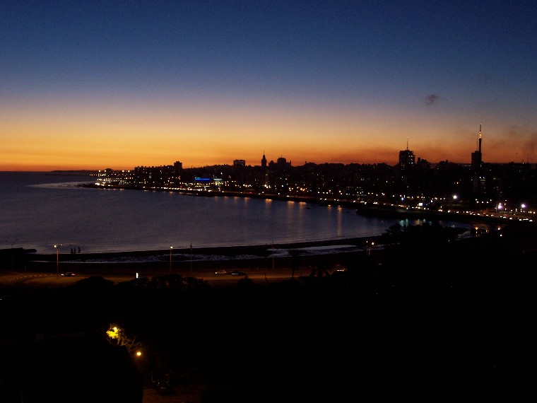 Vista de la playa Ramirez al atardecer, desde la Facultad de Ingeniería, Montevideo, Uruguay. tomada por Federico Corral aka Shant